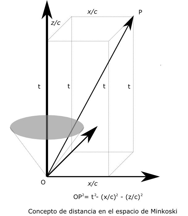 Concepto de distancia en un espacio de cuatro dimensiones